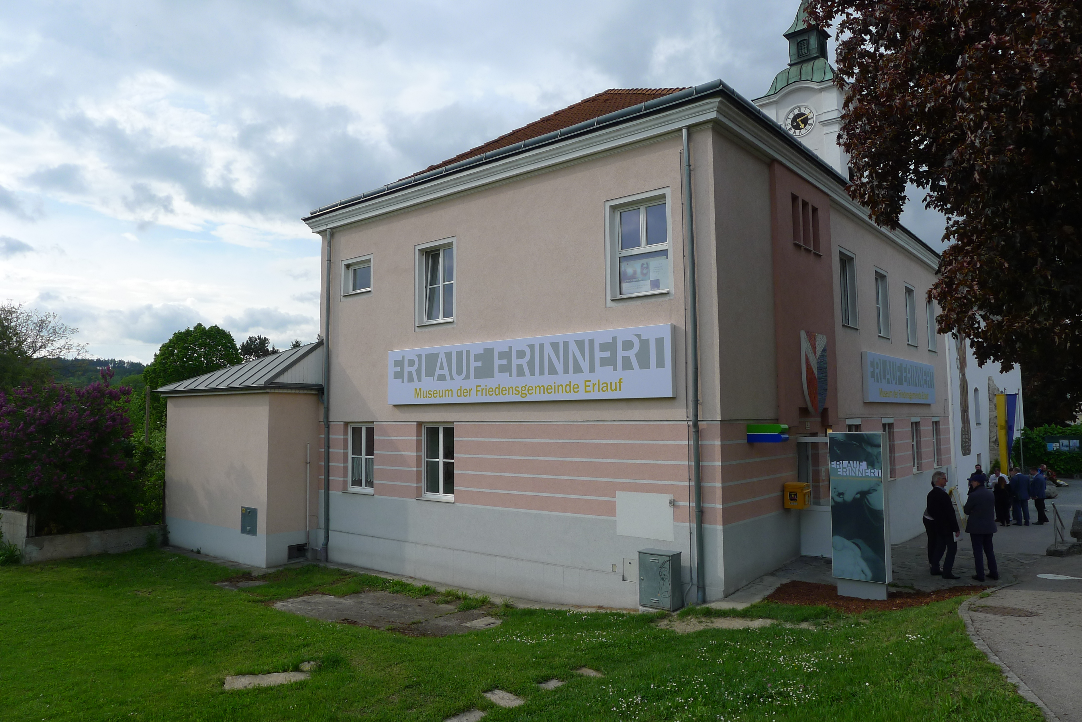 Friedensmuseum Erlauf am Eröffnungstag